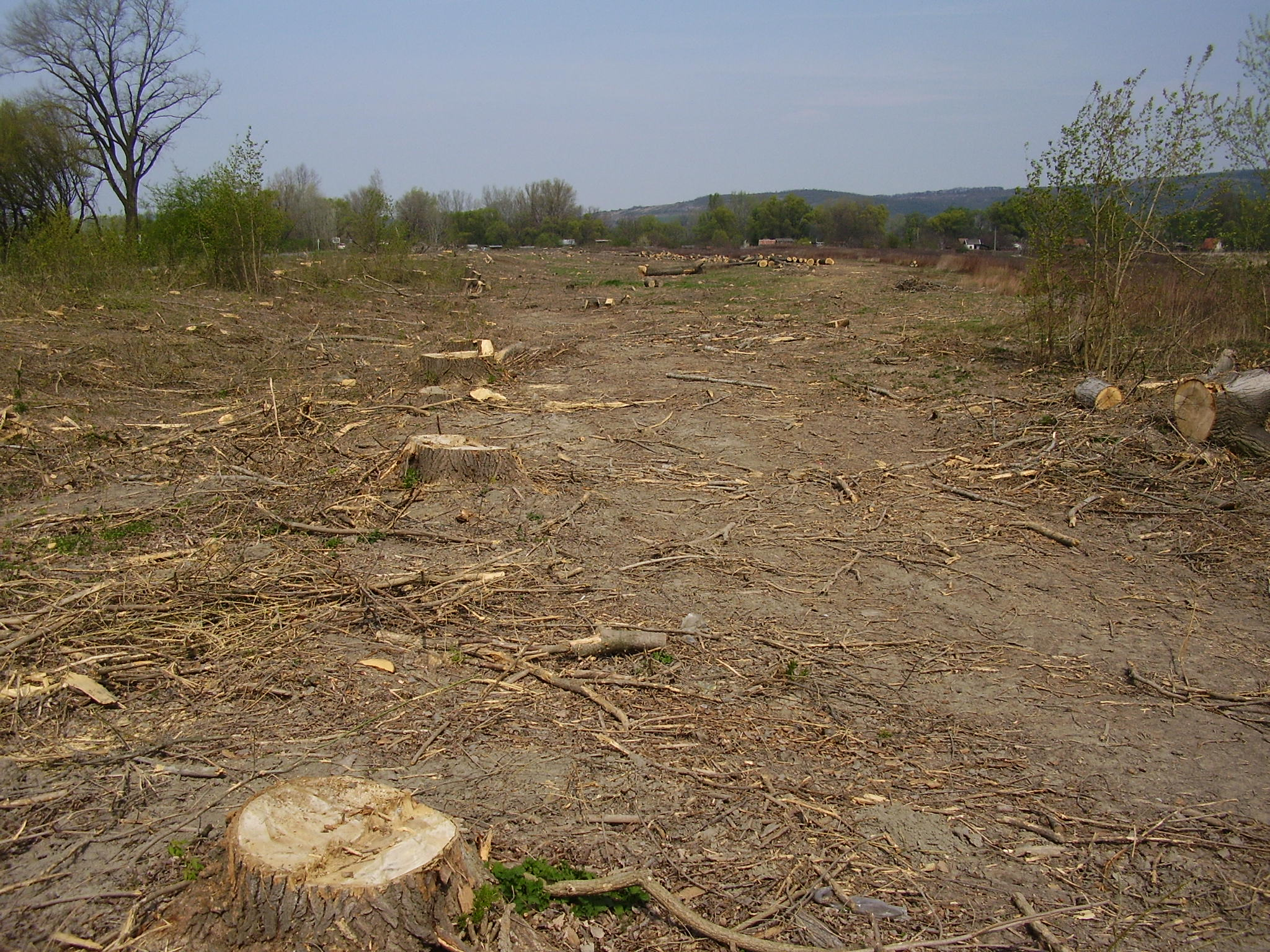 Own work.